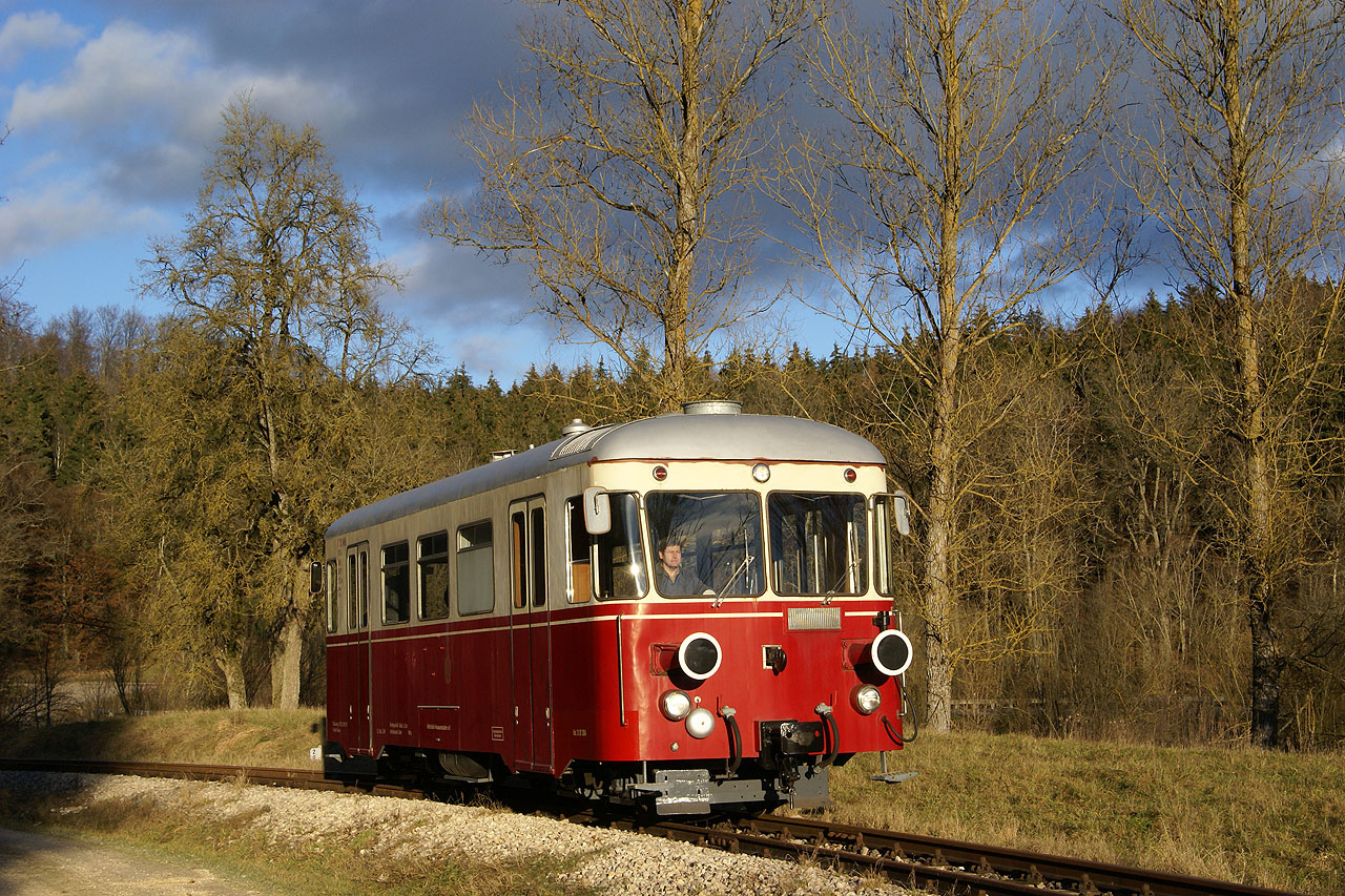 T 33 der Härtsfeld-Museumsbahn an der Einfahrt des ehemaligen Bahnhofs Härtsfeldwerke.